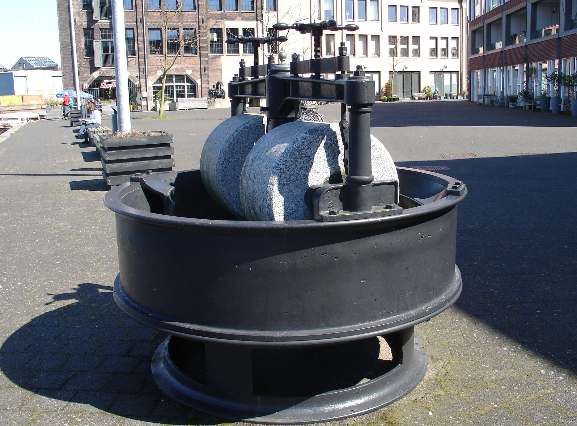 Machine uit de voormalige Droste chocoladefabriek